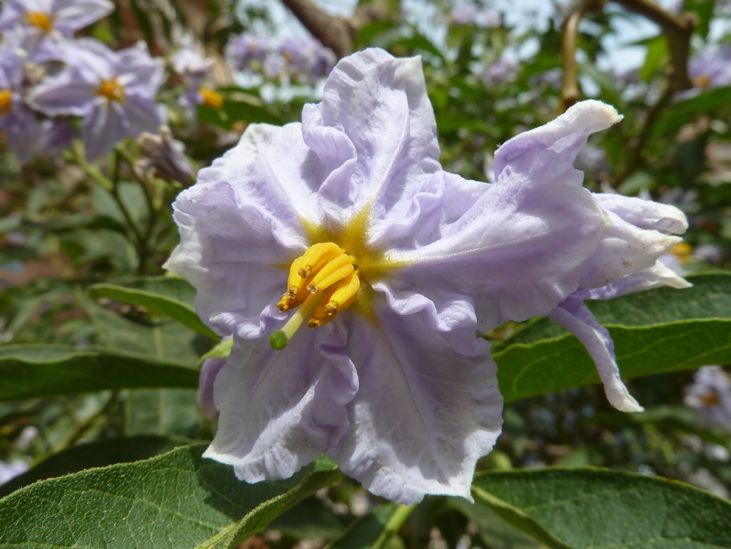 Solanum bonariense (Granadilla) : Flor azulada - Avenida del Calvario, Albatera (Alicante, España).